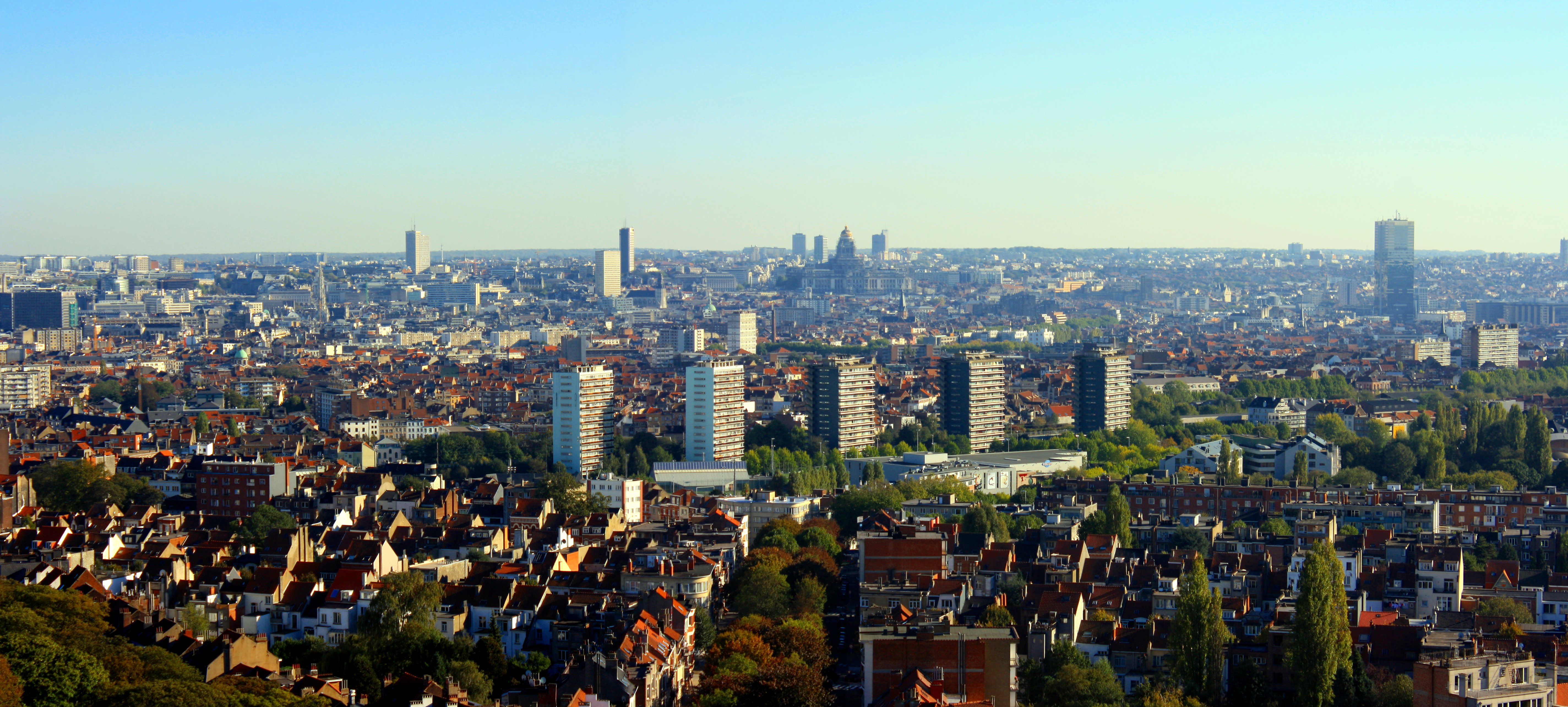 Panorama de Bruxelles pris depuis la Basilique de Koekelberg